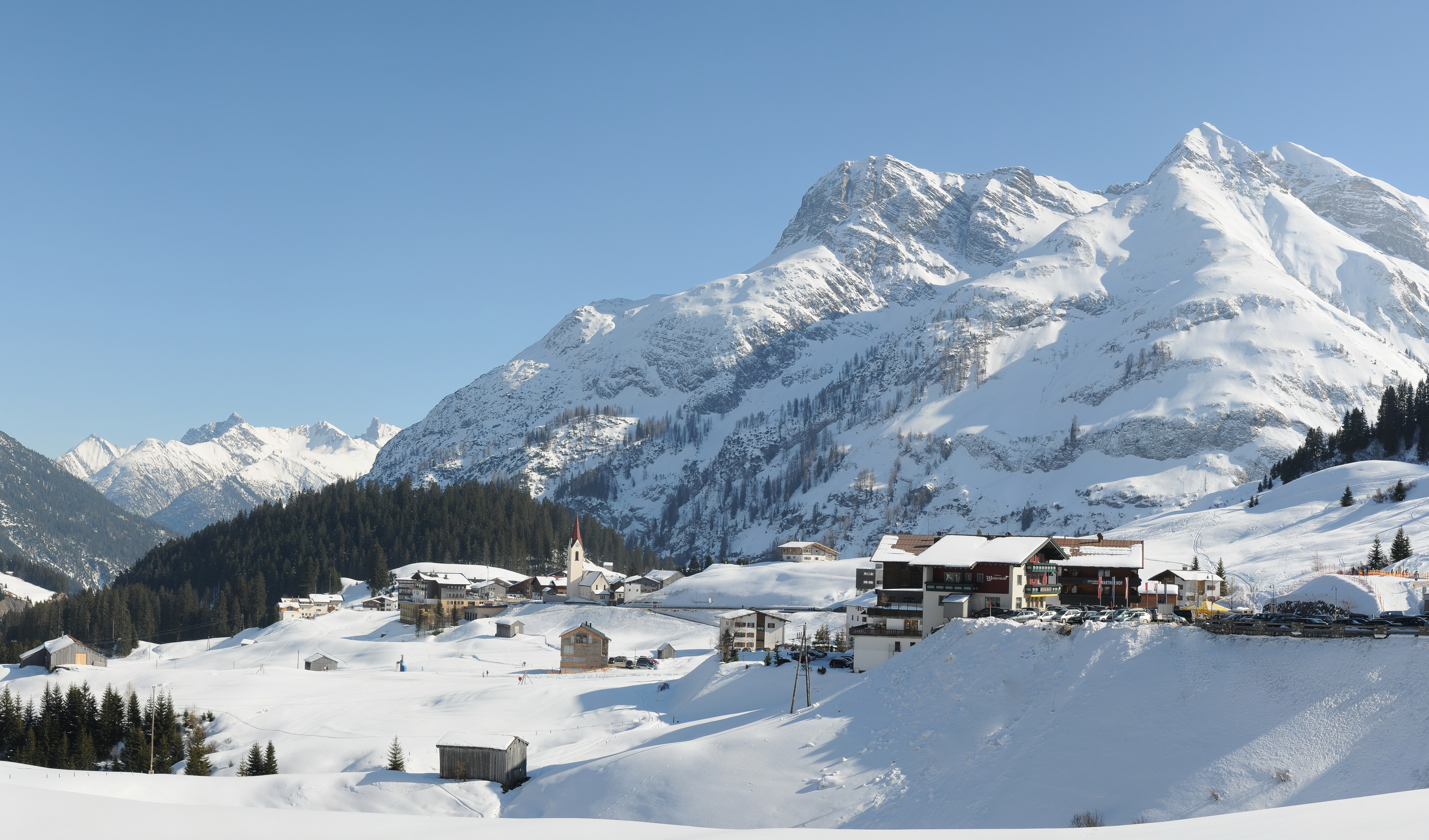 Panoramaaufnahme von Warth.